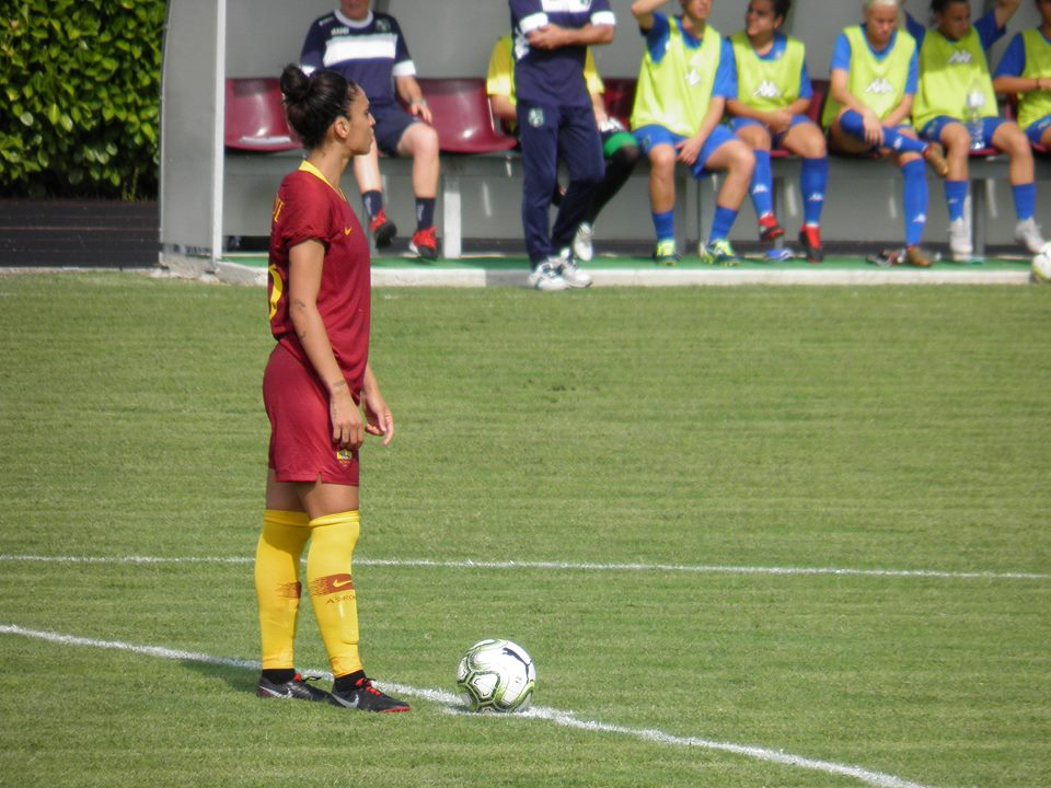 San Polo d'Enza, stadio comunale: Incontro tra il Sassuolo e la Roma, prima giornata di Serie A di calcio femminile della stagione 2018-2019.